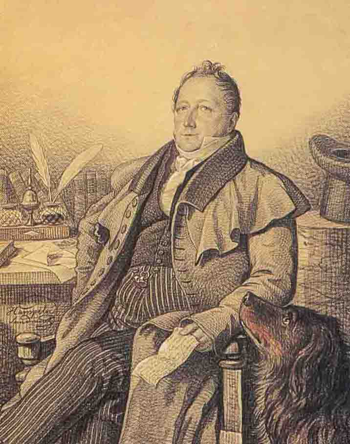 Сергѣй Львовичъ Пушкинъ